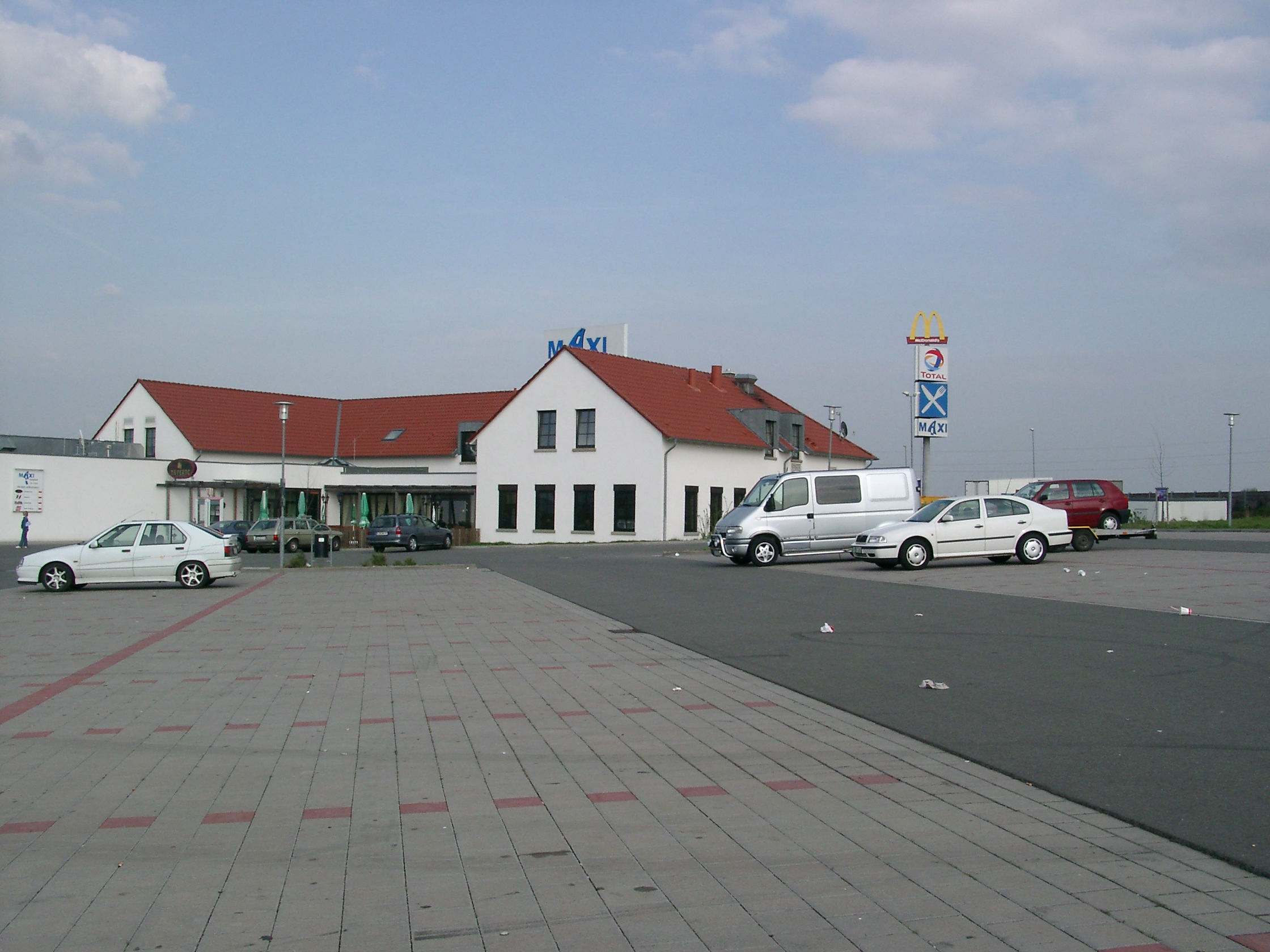 Autohof Maxi ganz in der Nähe von Grünstadt, aber nicht auf dessen Gemarkung!